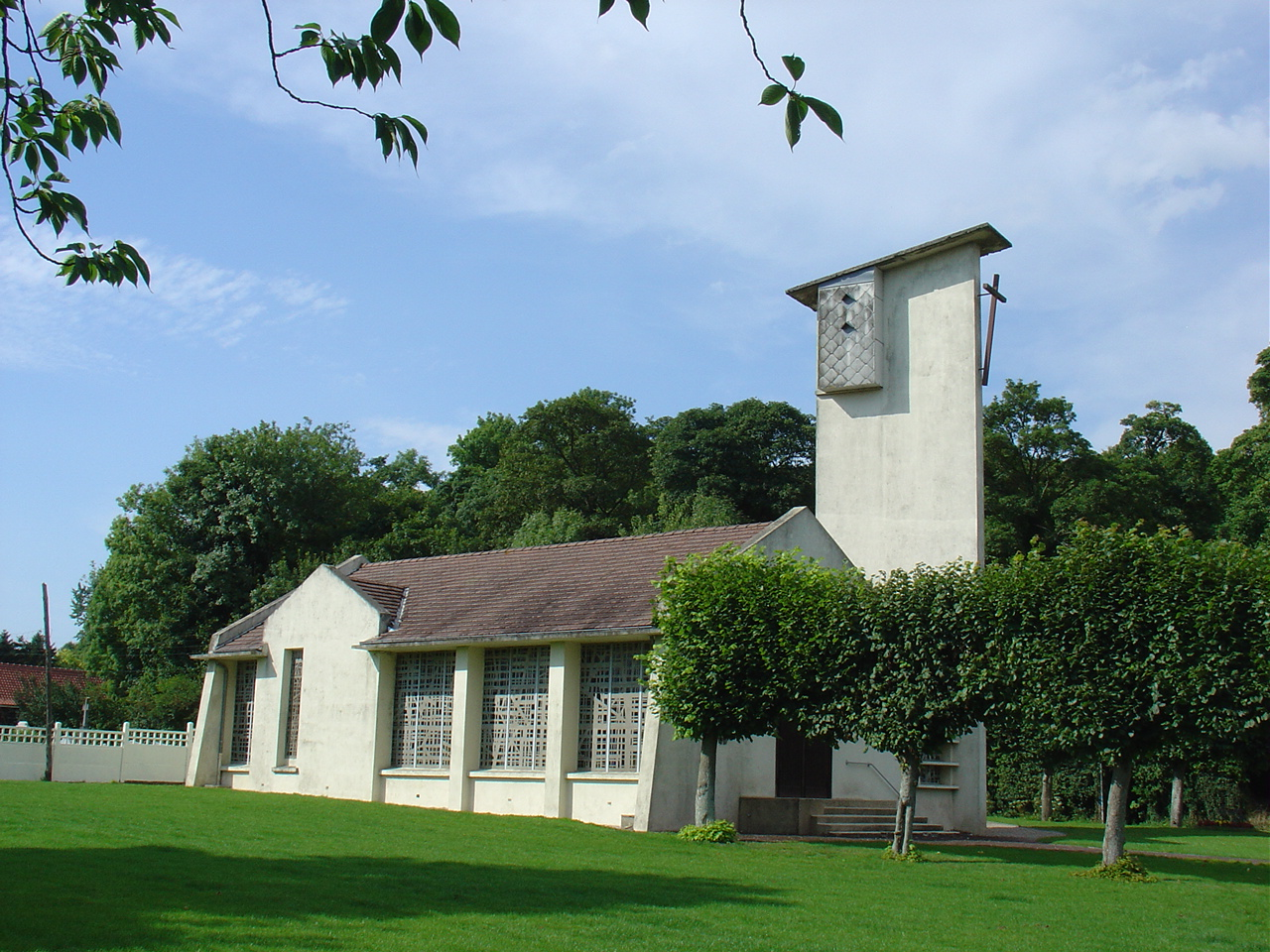 église de Boyaval